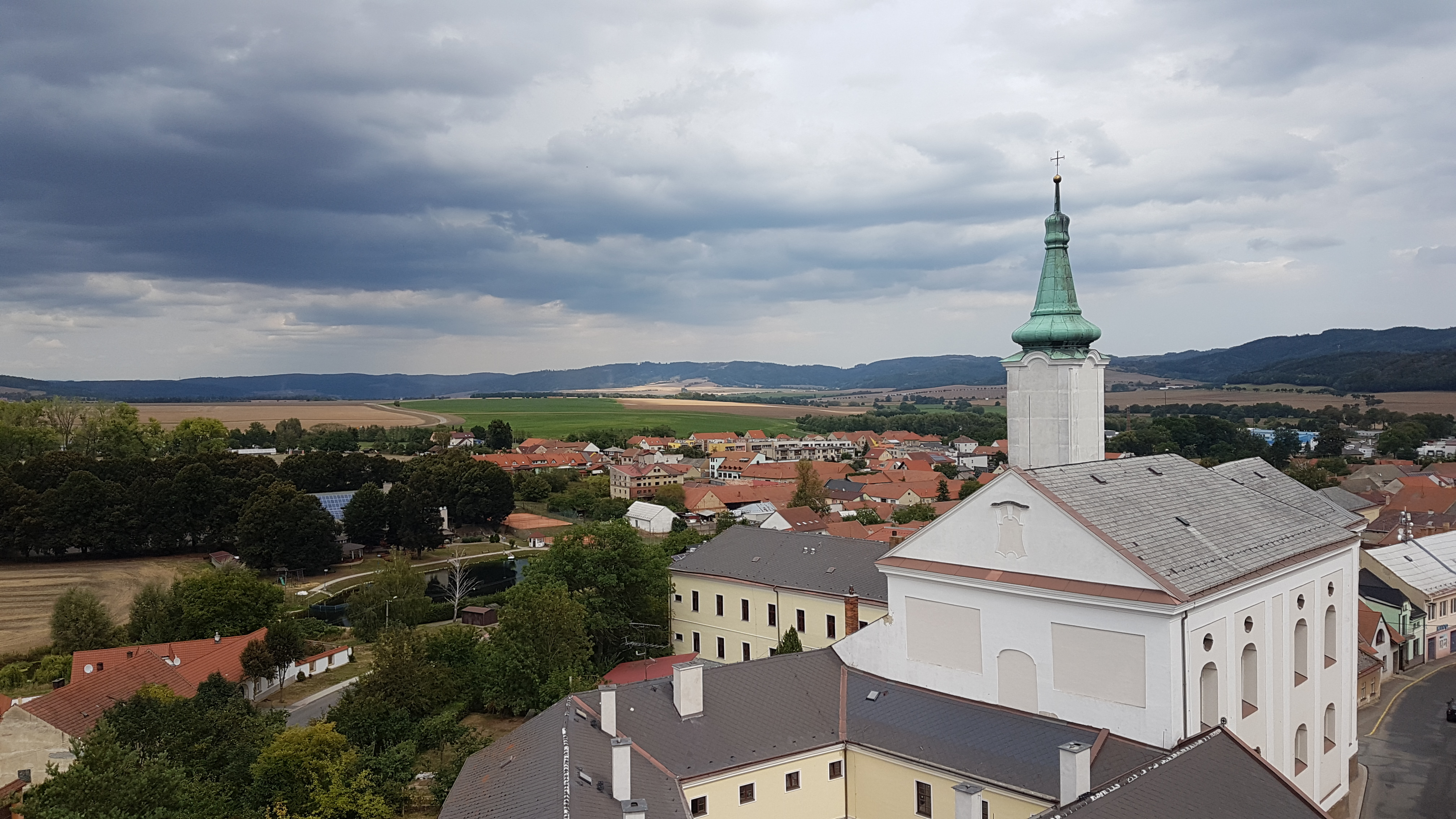 Pohled z věže na kostel a okolí